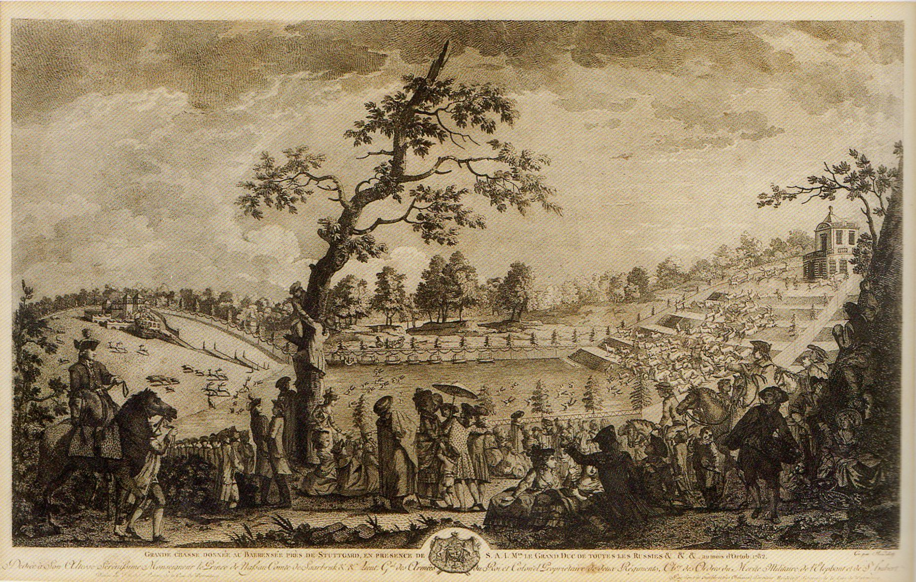 Große Jagd am Bärensee zu Ehren des Großfürsten Paul von Russland am 24. Sept. 1782